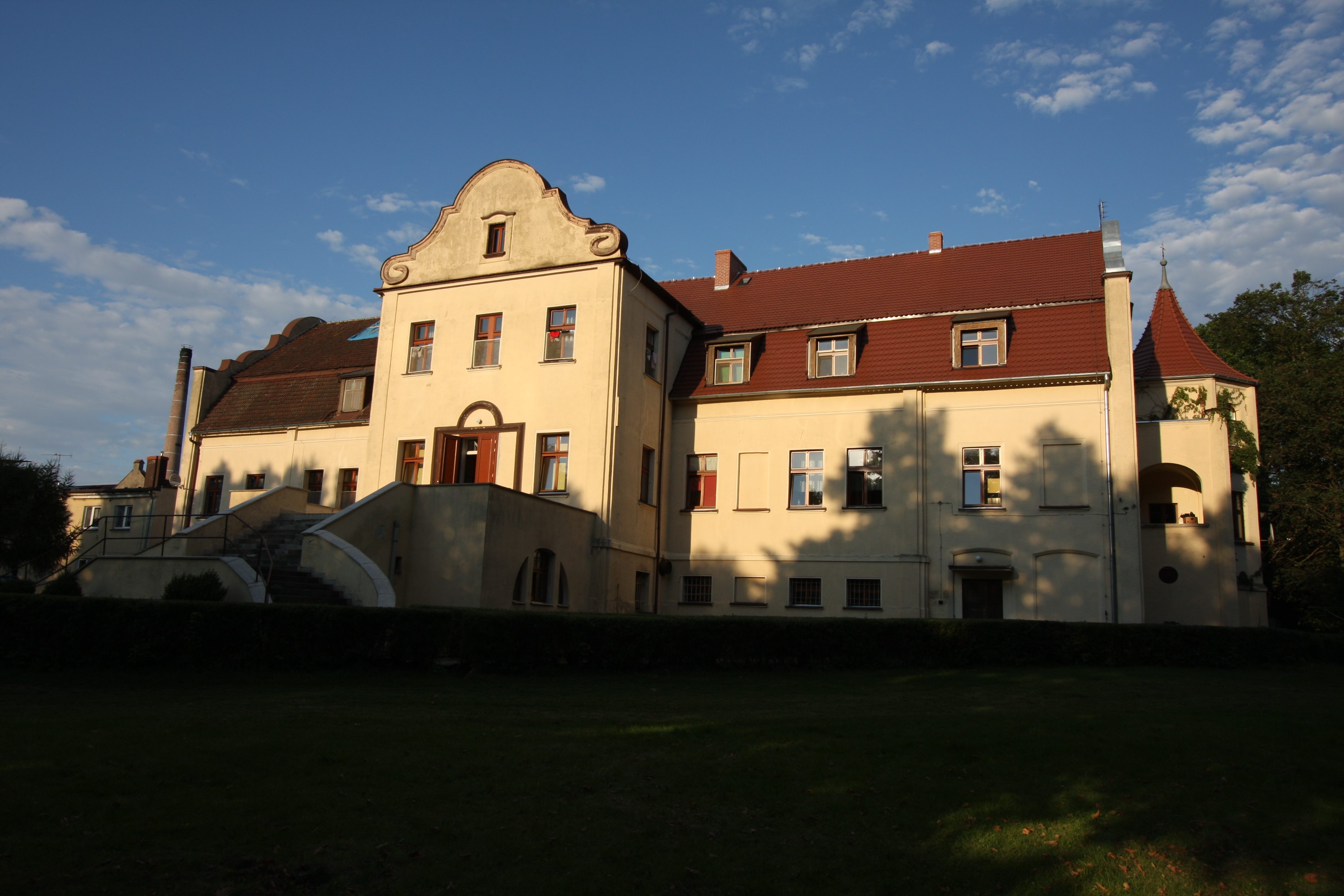 Wojnowo, pałac, mur., 1 poł. XIX (zabytek nr rejestr. 3280)